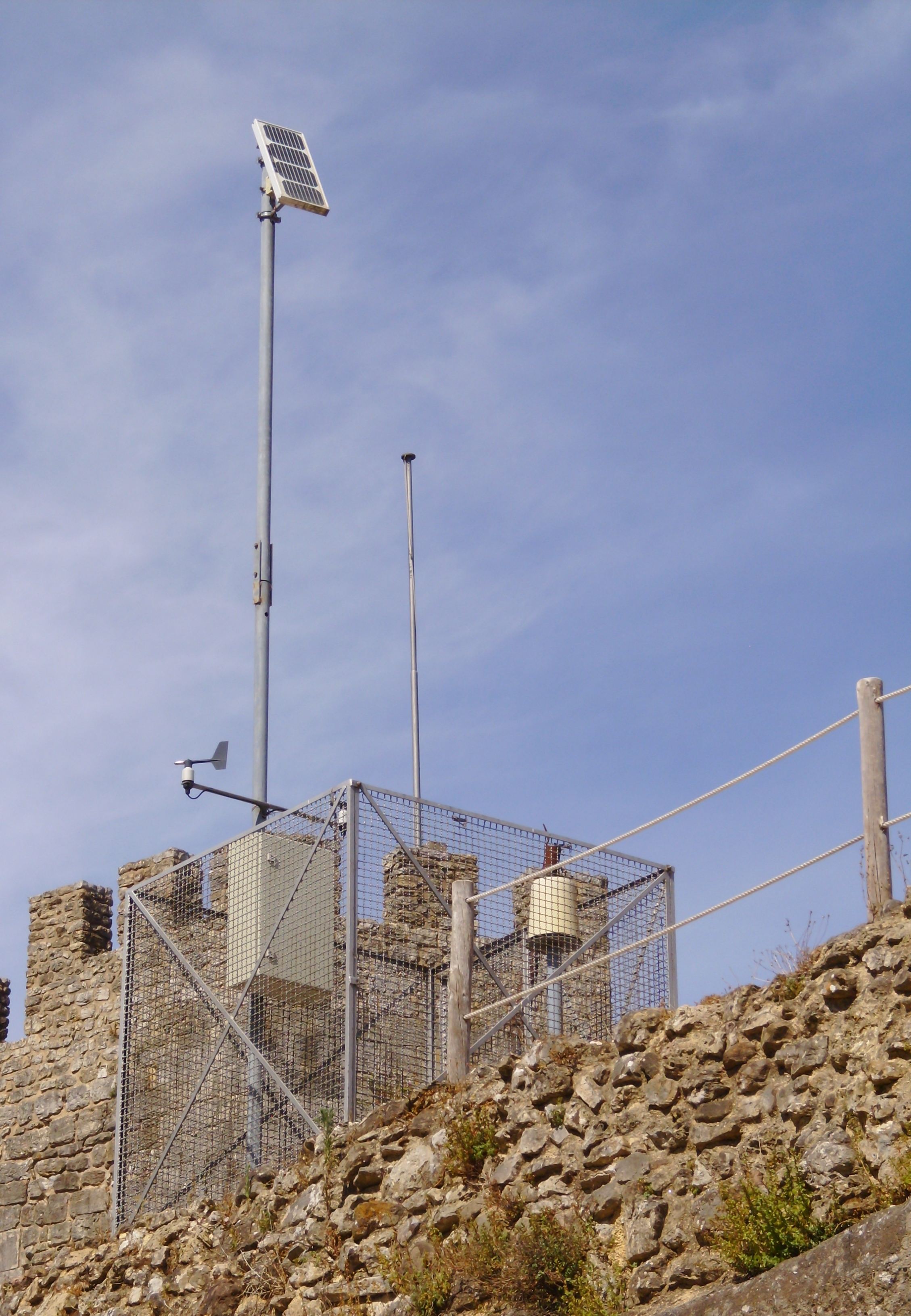 Castelo de Penela, freguesia de Santa Eufémia, concelho de Penela, distrito de Coimbra, Portugal: estação meteorológica.